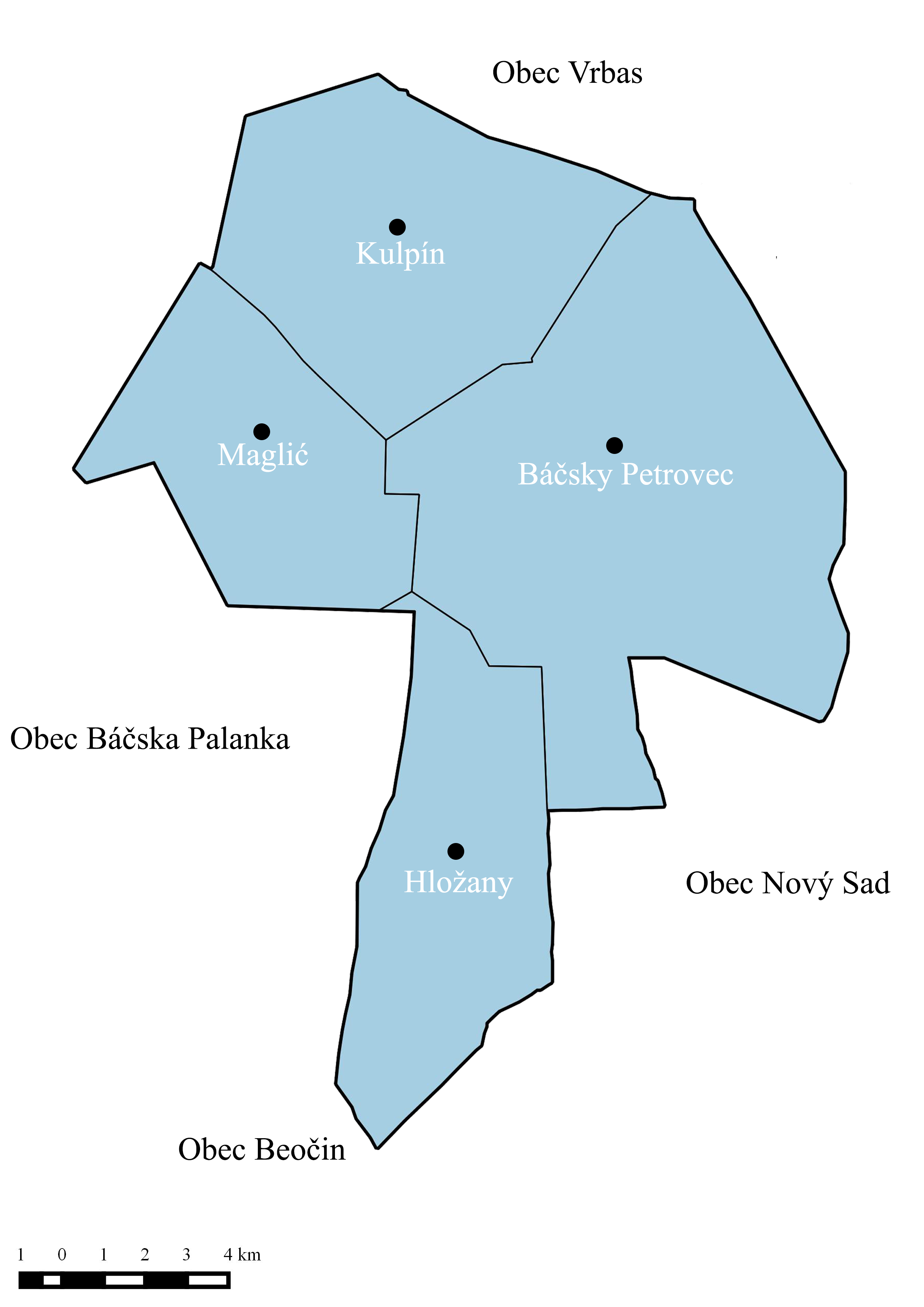 Vymedzenie územia obce